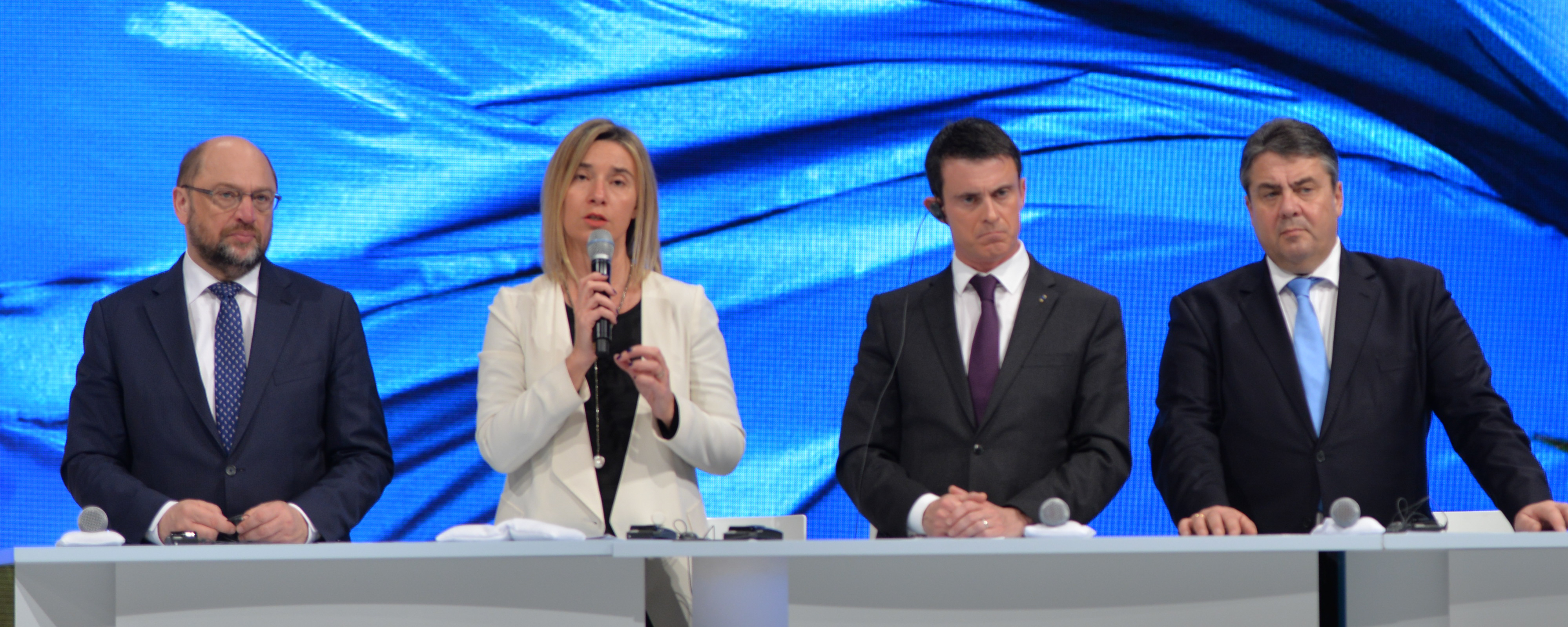 SPD Bundesparteitag 2015 - Gruppenaufnahmen